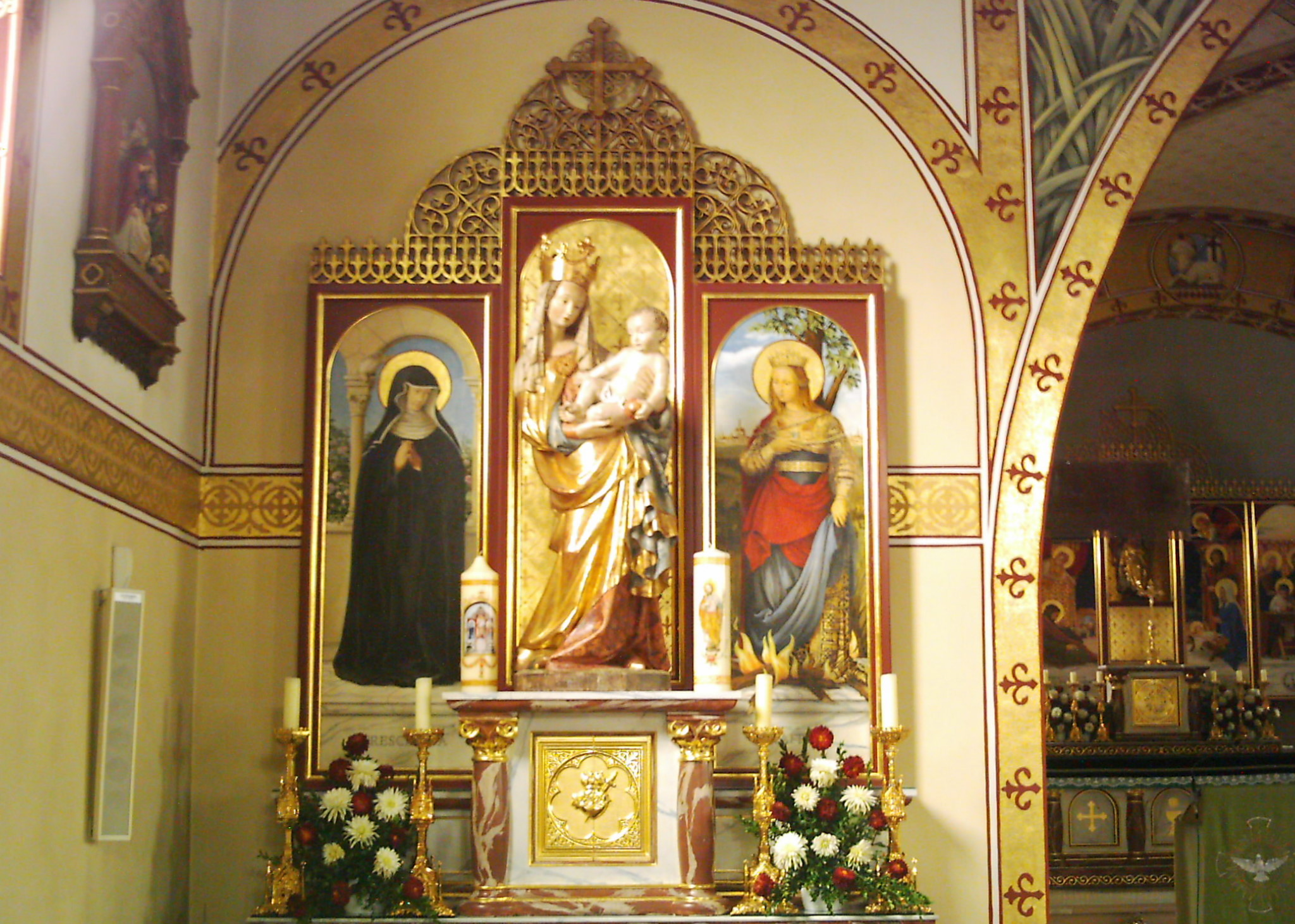 Marienaltar der Piusbruderschaftskirche St. Joseph in Memmingen. Maria wird flankiert von der Hl. Krezentia von Kaufbeuren (links) und der Hl. Afra von Augsburg (rechts)